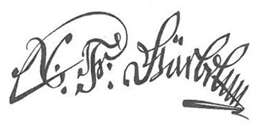 Автограф архитектора Н.Ф. Гербеля